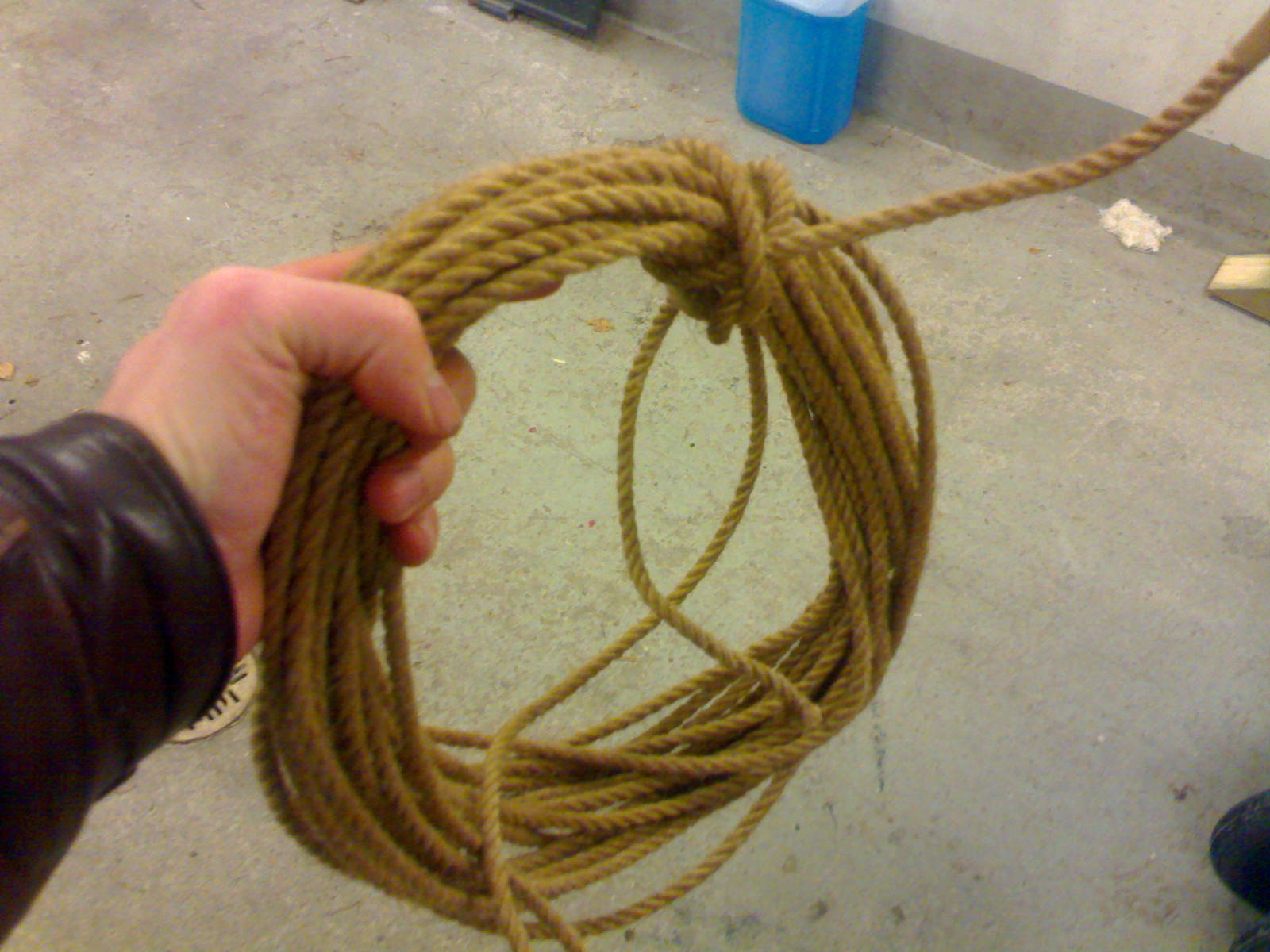 Suopungin aihio: kovaksi punottu hamppunaru.